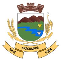 Brasão oficial da cidade de Araguainha-MT